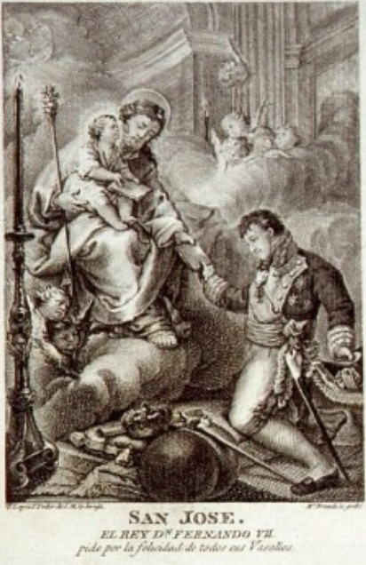 Fernando VII pidiendo por su pueblo